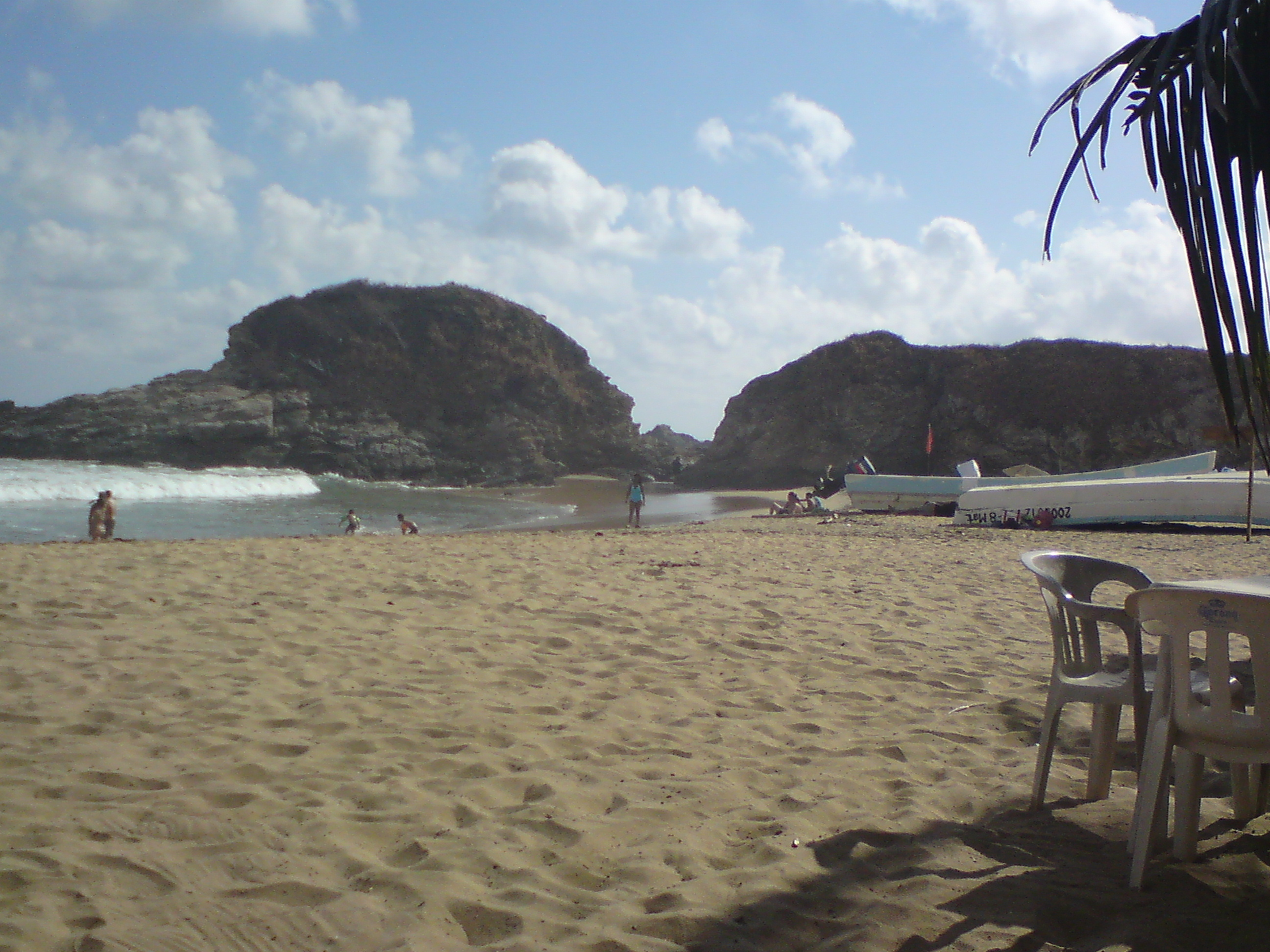 Playa de San Agustinillo